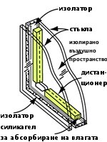 схема на стъклопакет